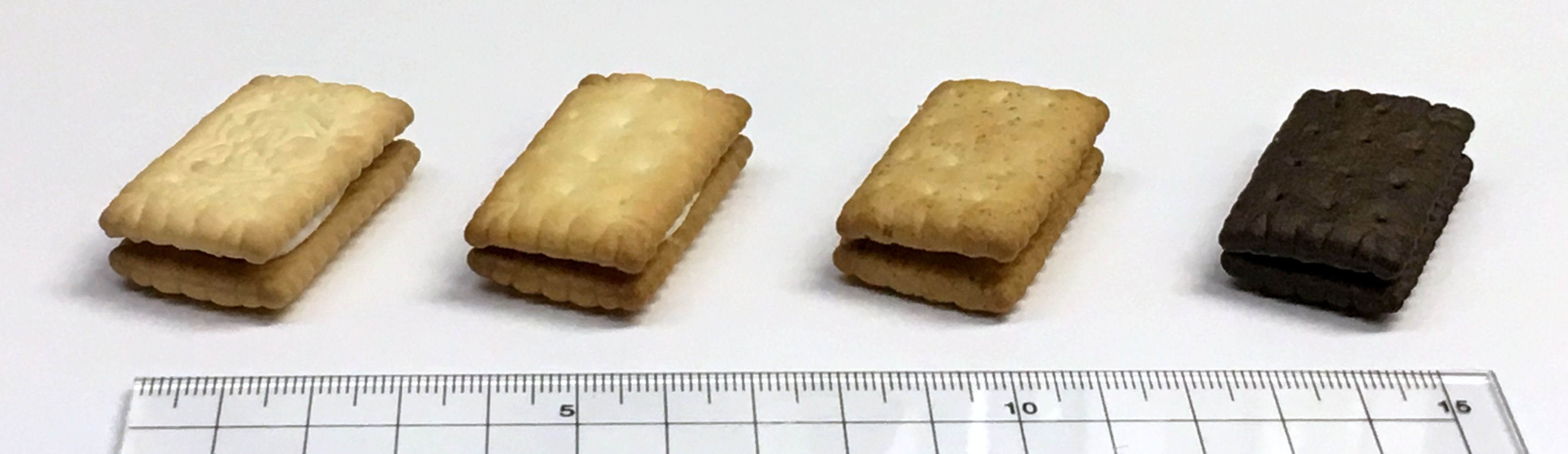 江崎グリコのビスコ。左から、無印、発酵バター仕立て、小麦麦芽入り、焼きショコラ。定規はセンチ尺。